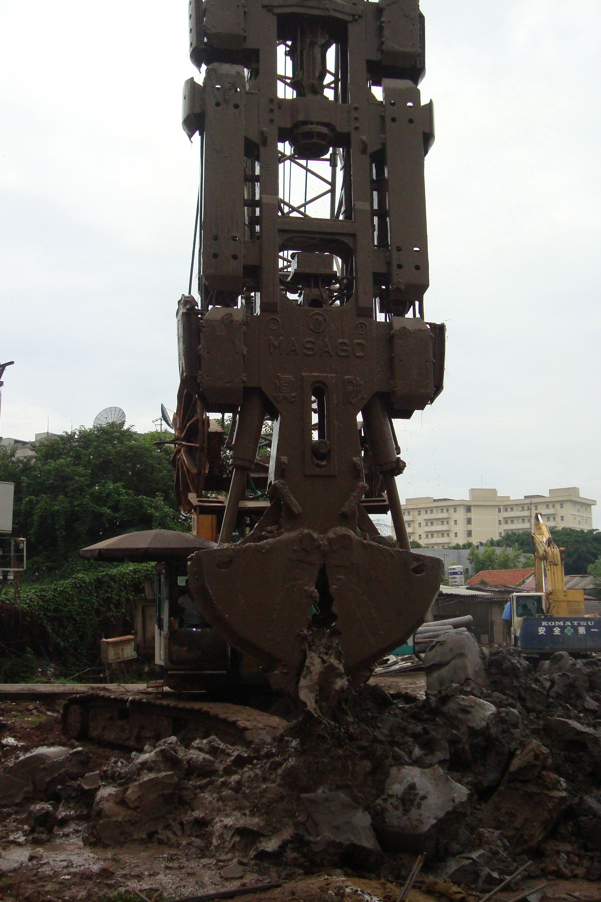 Hình tự chụp